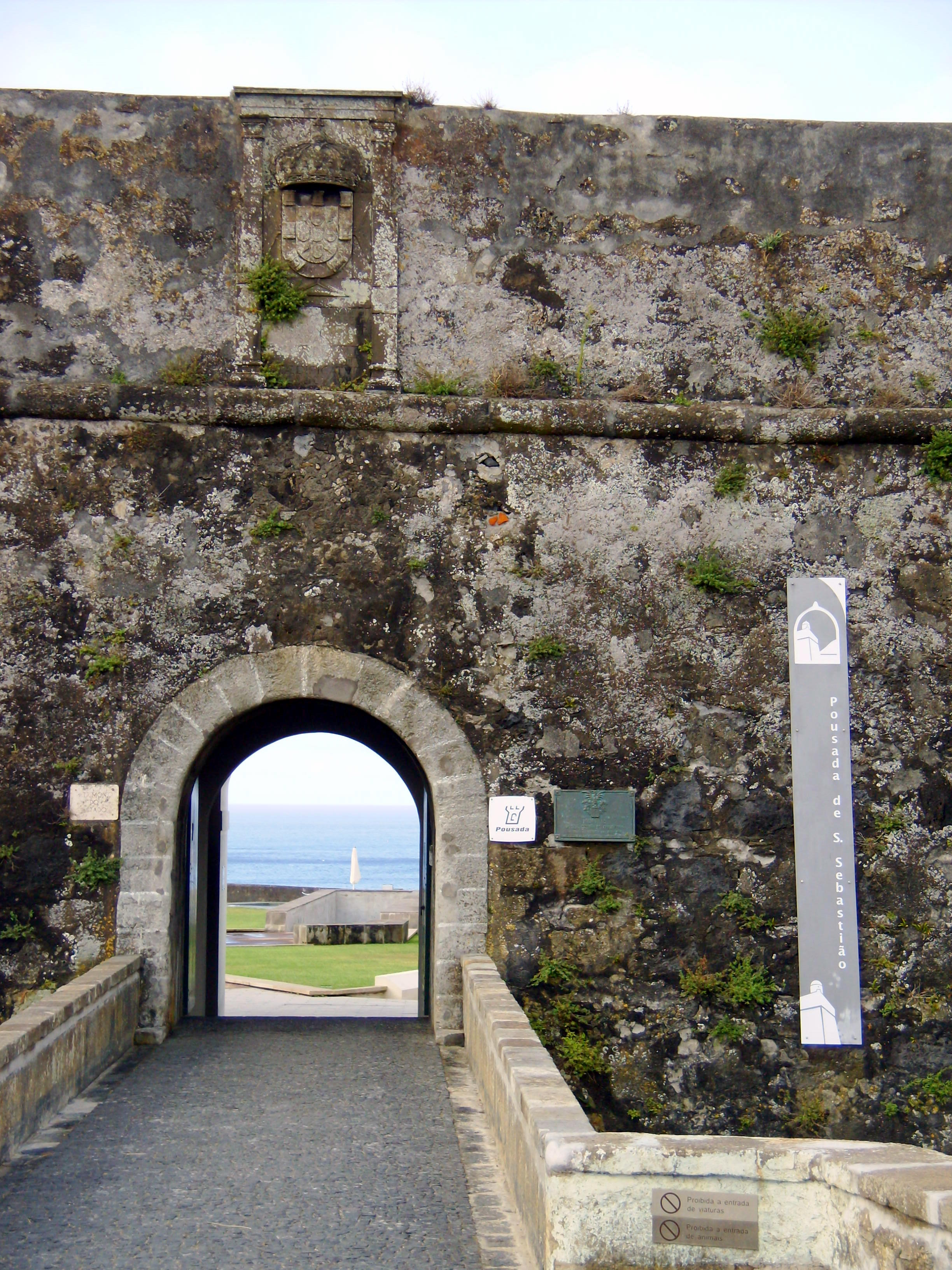 Forte de São Sebastião, freguesia de Nossa Senhora da Conceição, cidade e concelho de Angra do Heroísmo, ilha Terceira, Açores: Portão de Armas.